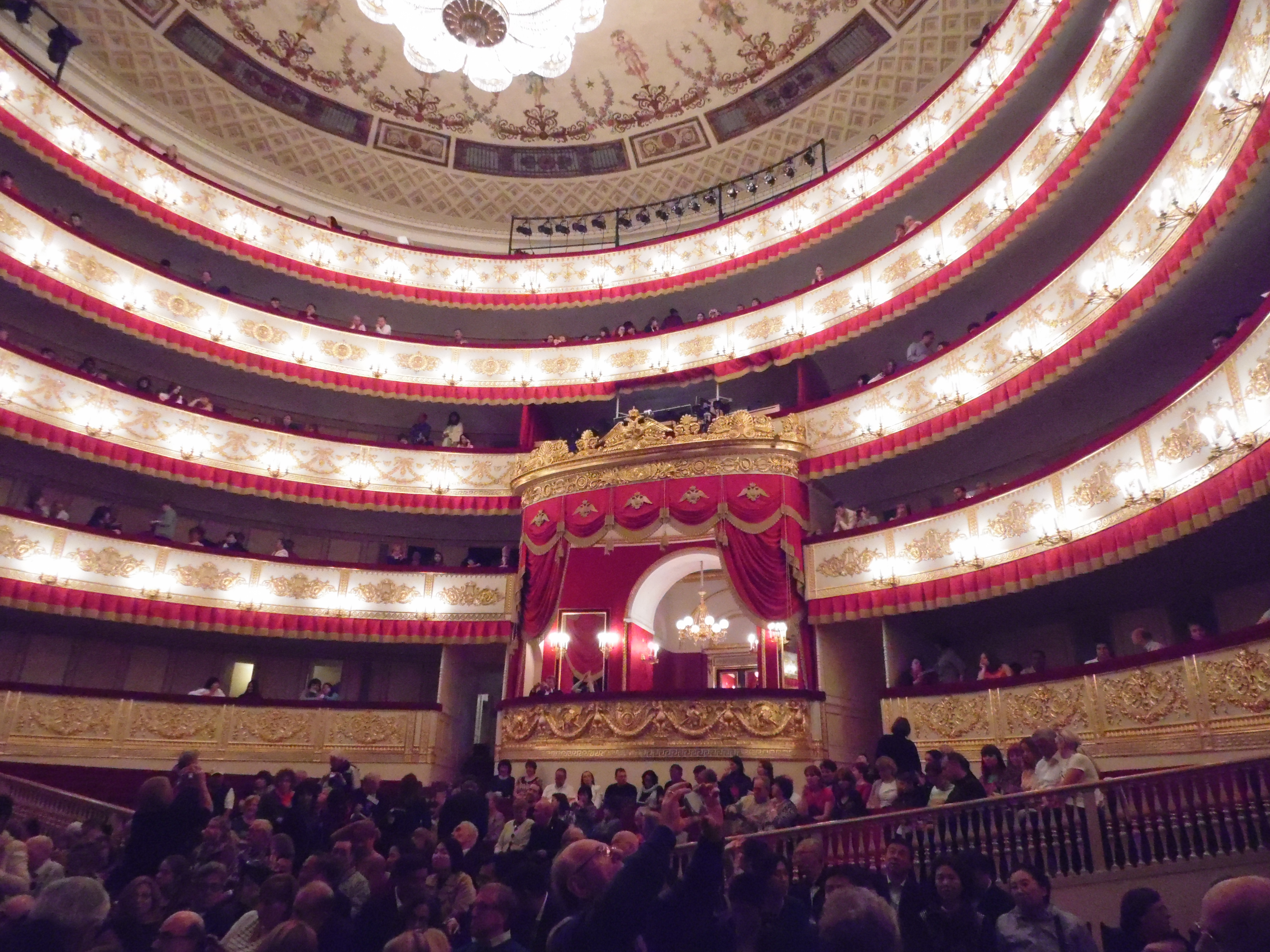 Alexandrinski-Theater St. Petersburg